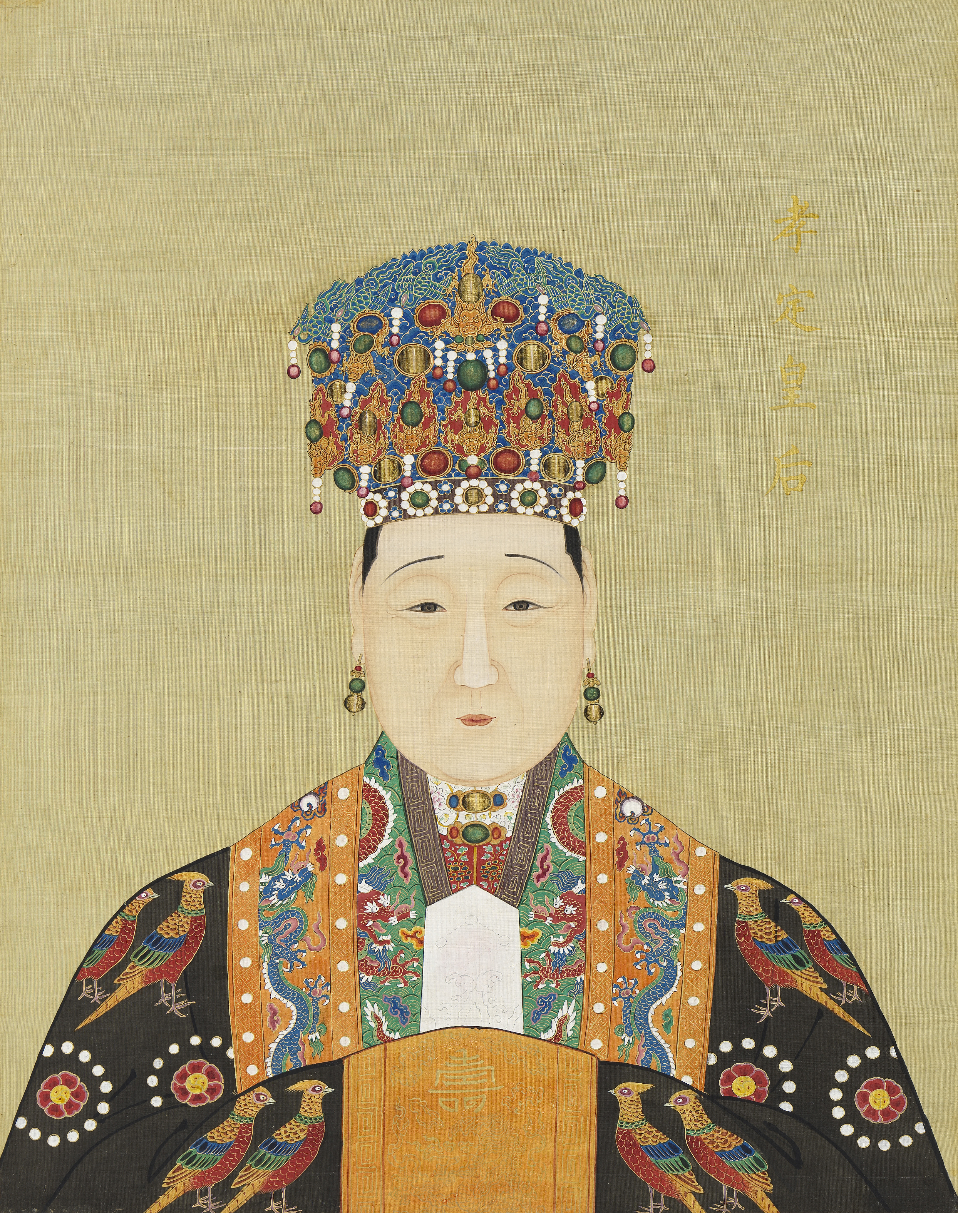 明代帝后半身像（二） 冊 孝定皇后